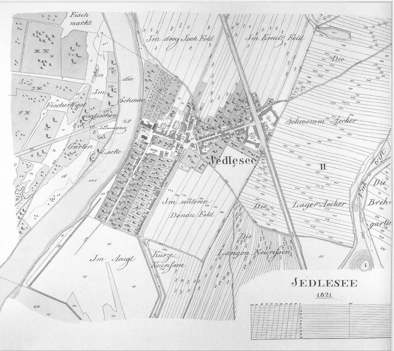 Map of Jedlesee (Wien)